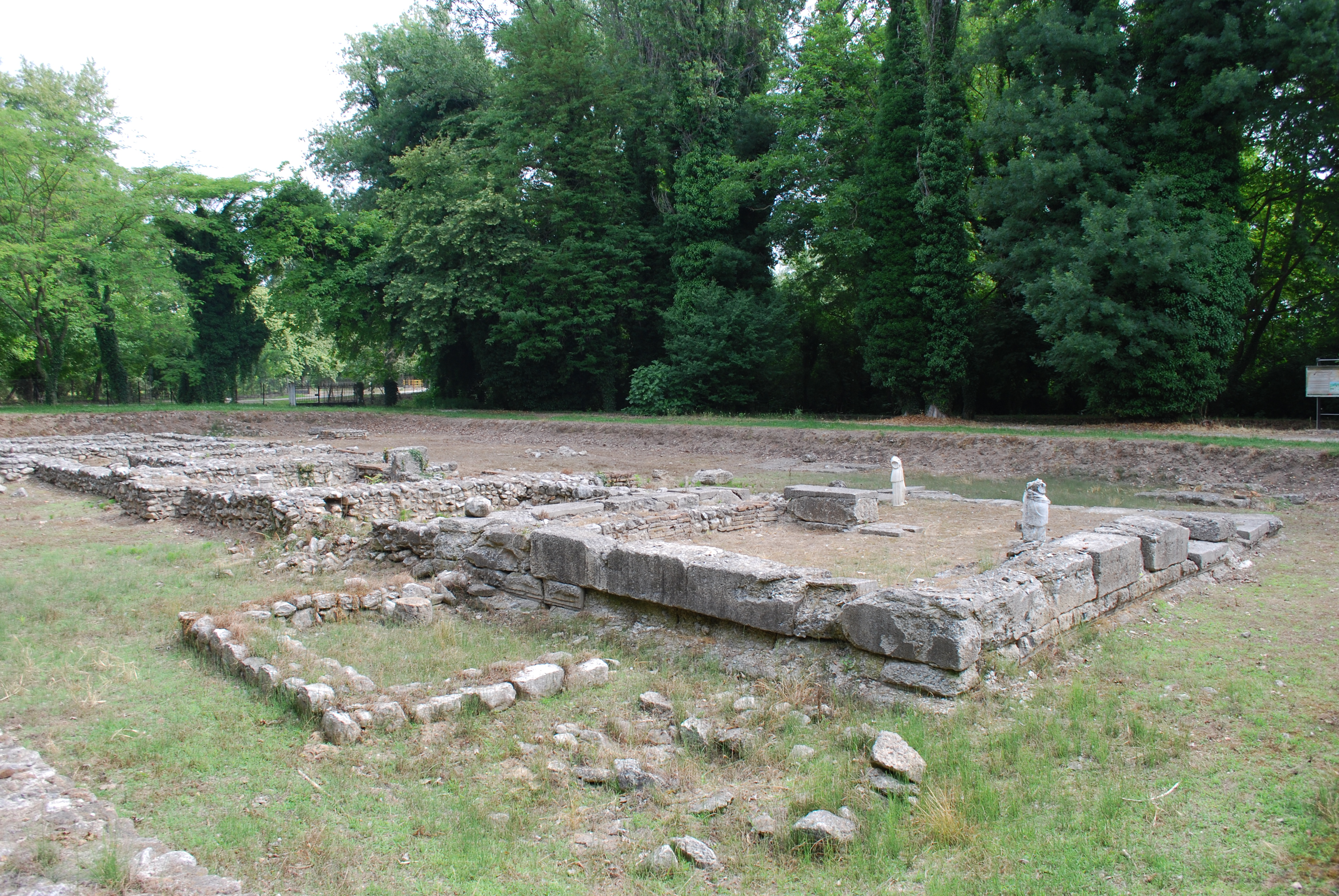 Vue du site archéologique de l'ancienne Dion, au pied du Mont Olympe en Grèce.